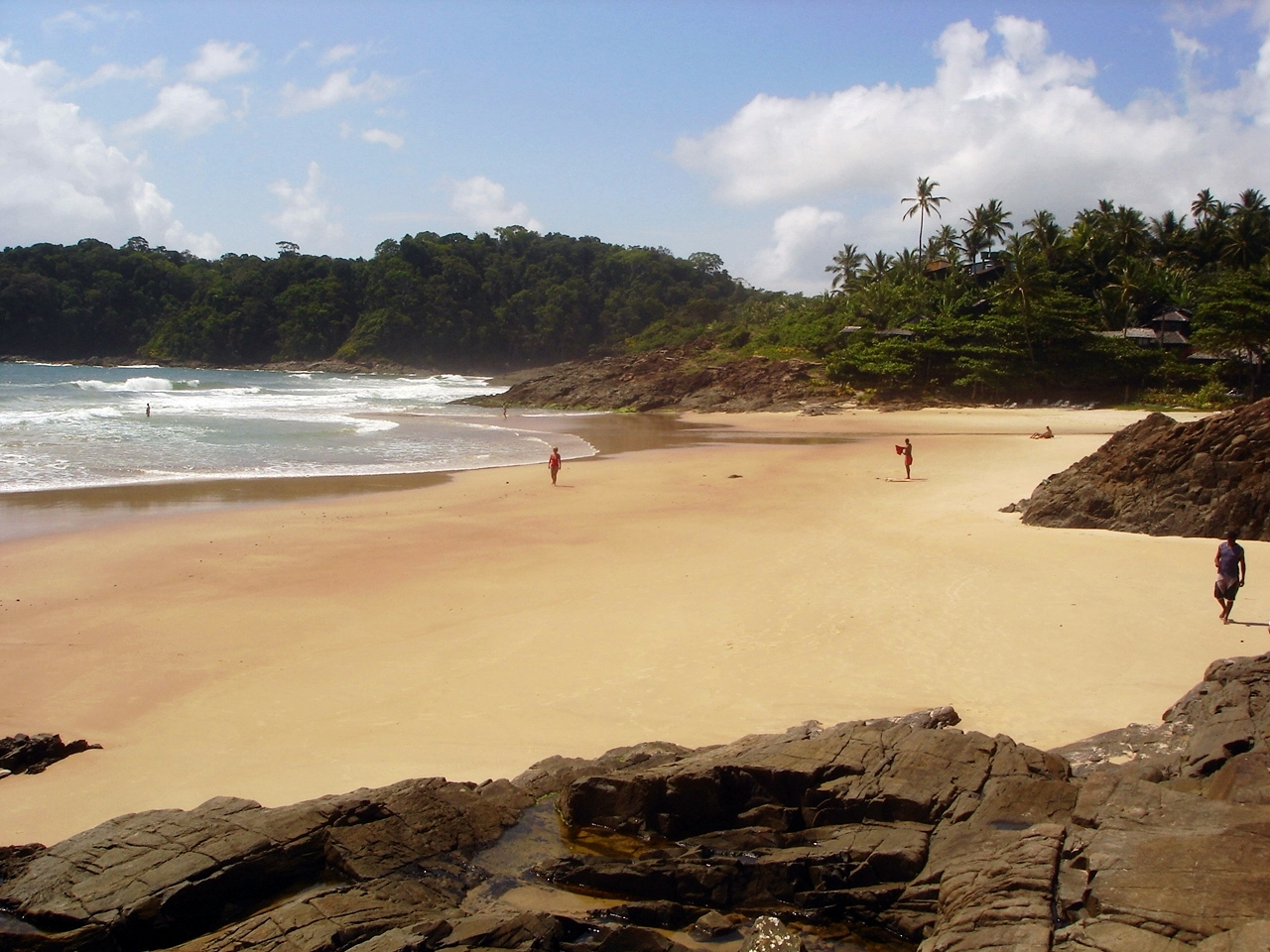 Praia da Tiririca, Itacaré, Bahia